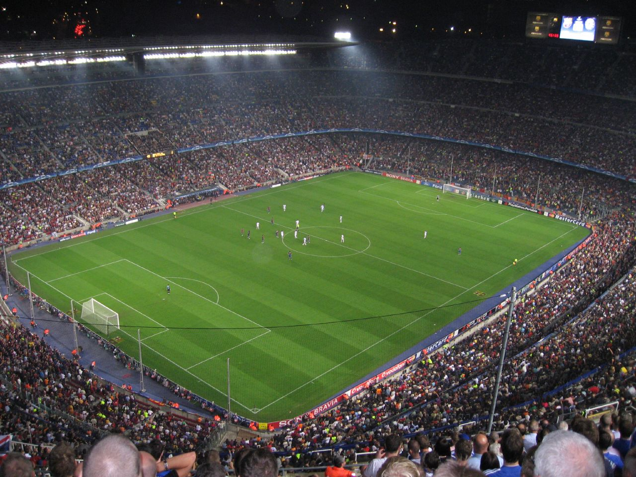 Barcelona, Camp Nou, FC Barcelona vs Chelsea